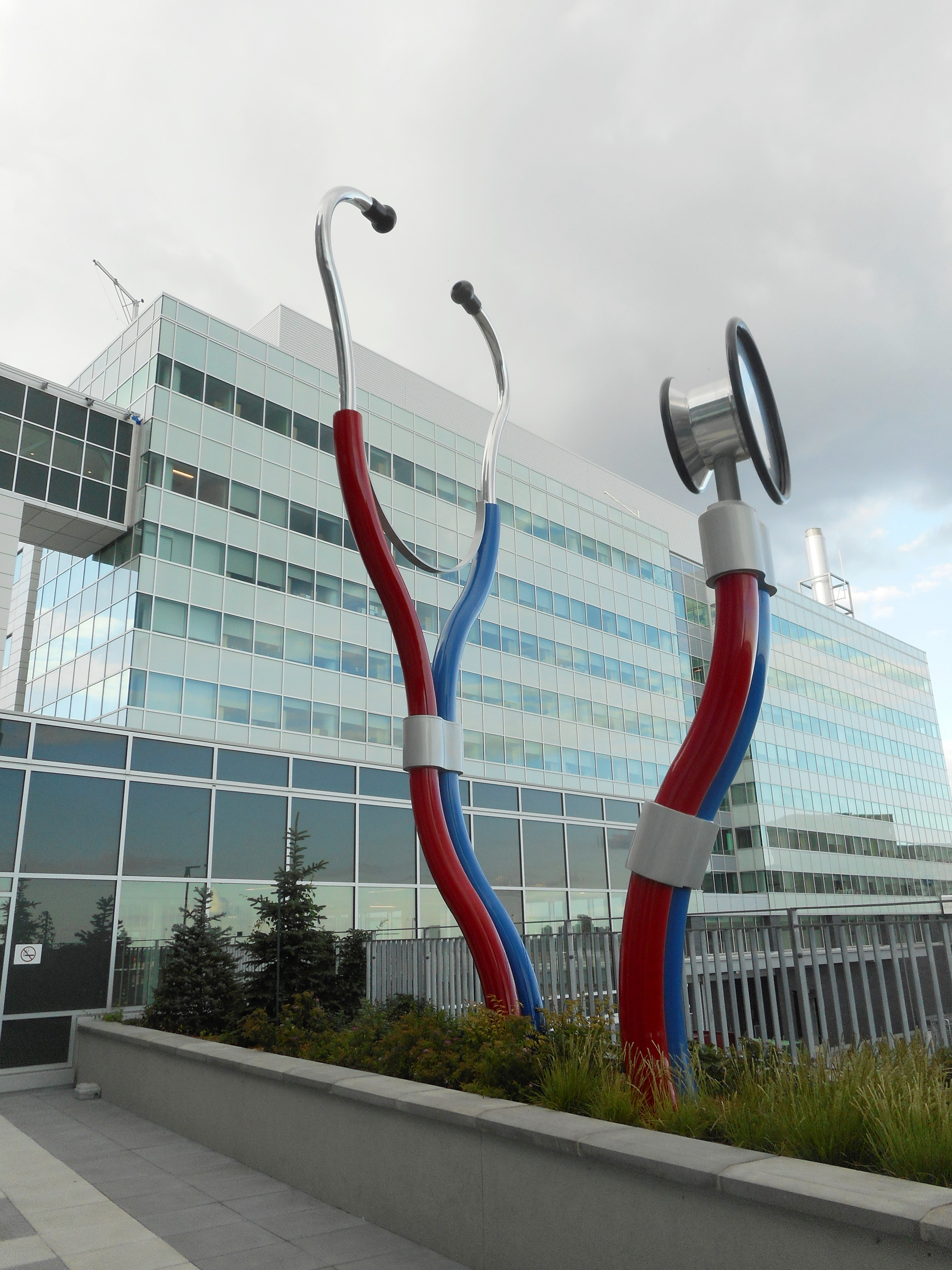 Prendre le pouls est une sculpture réalisée par le duo Cooke-Sasseville en 2013, située sur le site Glen du Centre universitaire de santé McGill. cusm.ca